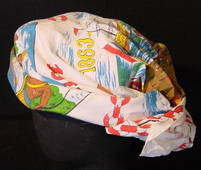 Hoofddoek. Nagenoeg vierkante, polychroom bedrukte hoofddoek ter herdenking dat 100 jaar geleden de slavernij in Suriname werd afgeschaft. Op een witte ondergrond zijn gebroken ketenen afgebeeld, het jaartal 1863, een schip, het wapen van Suriname en een slaaf. Dergelijke hoofddoeken worden door Creoolse vrouwen gedragen op 1 juli om de afschaffing van de slavernij te vieren. Ongevouwen en onopgemaakt kunnen ze ook als siervoorwerp aan de wand gehangen worden of gebruikt worden als tafelkleedje. Een angisa vormt onderdeel van een kostuum, de kotomisi. De koto is een in Suriname ontstane klederdracht die werd bedacht door slavenhouders en hun vrouwen om hun slavinnen 'zedig' te kleden. De dracht bestaat uit een koto (rok), jaki (jak) en angisa (hoofddoek). Aan de dracht kon men aflezen tot welke godsdienst de slavenhouder behoorde. Hoewel vroeger dagelijkse kleding, veranderde de koto later in gelegenheidskleding. De koto en vooral de angisa spraken en spreken een geheime taal (Henar-Hewitt, 1987:35).. Surinaams-Creoolse vrouwenhoofddoek, ter gelegenheid van 100 jaar afschaffing van de slavernij Undetermined language : Angisa